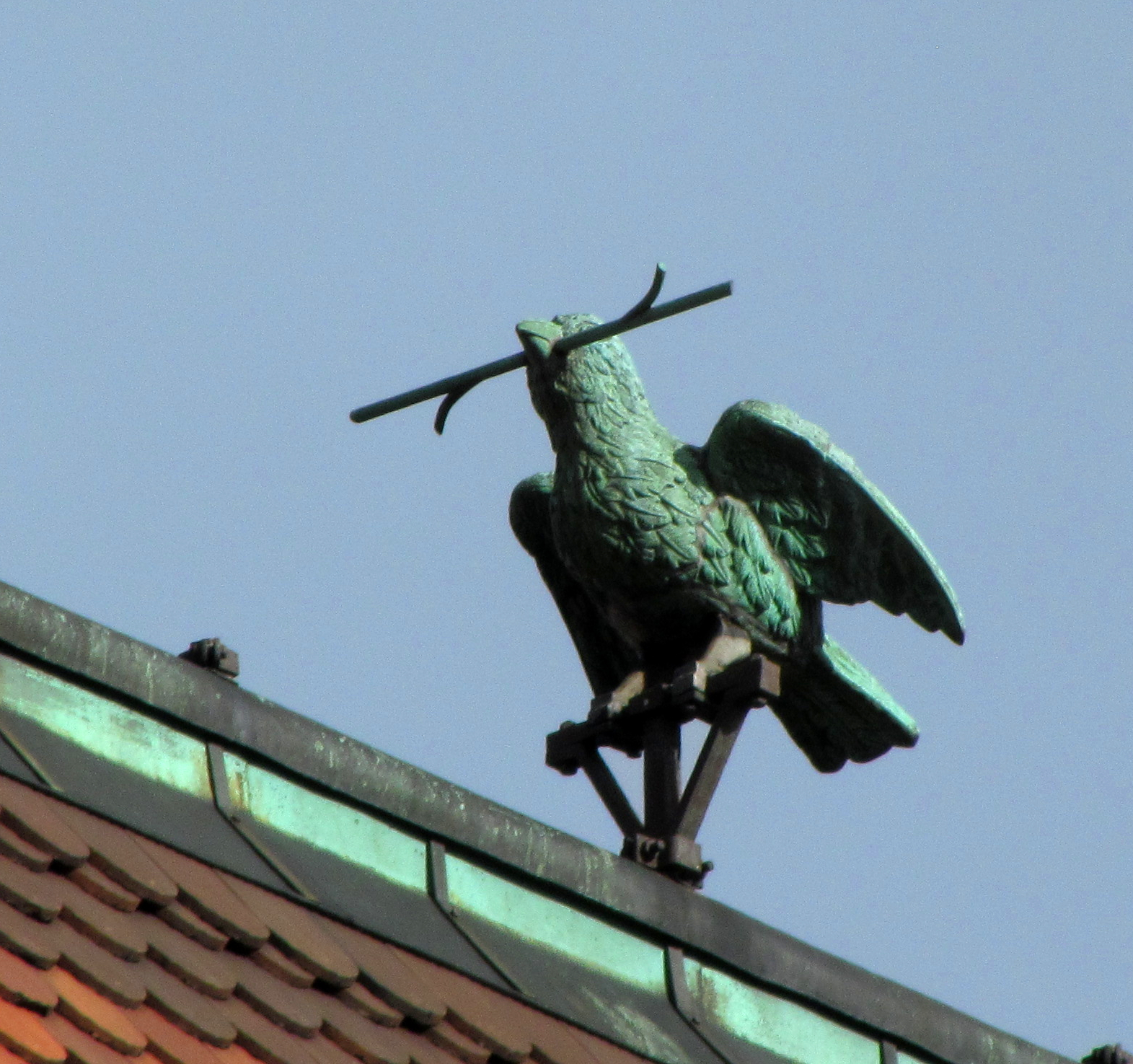 Bildinhalt: Der Ulmer Spatz auf dem Münster, aufgenommen von unten Aufnahmeort: Ulm, Deutschland